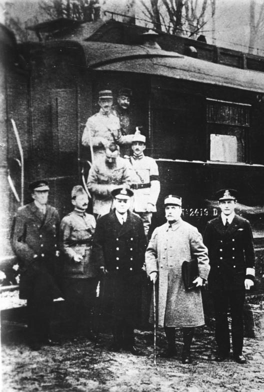 Hier war der Siegerübermut der Franzosen auf dem Höhepunkt Marschall [Ferdinand] Foch vor seinem Salonwagen im Walde von Compiègne, wo er die erste schwere Demütigung dem deutschen Volke zufügte, in dem er ihm die schmachtvollsten Waffenstillstandsbedingungen auferlegte, die die Welt jemals gekannt hat. Der zweite von links ist [Maxime] Weygand, der heutige Generalissimus der Franzosen, der sich heute an diese Stunde wahnwitzigen Siegerübermuts besonders nachdrücklich erinnern wird.